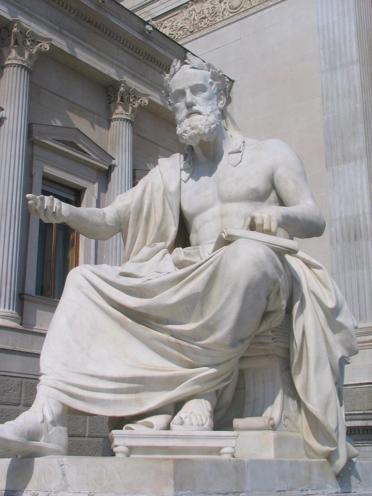 Xenophon-Statue auf der linke Rampe des Parlaments: griechische Seite